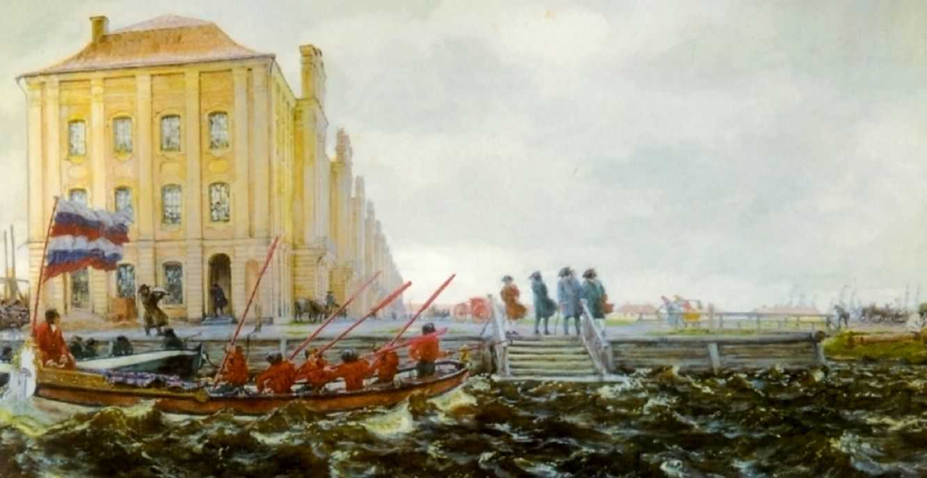 Лансере Евгений Евгеньевич. «Петербург в XVIII веке. Здание Двенадцати коллегий» 1903 Бумага, темпера 59 х 111,5 Государственный Русский музей Санкт-Петербург